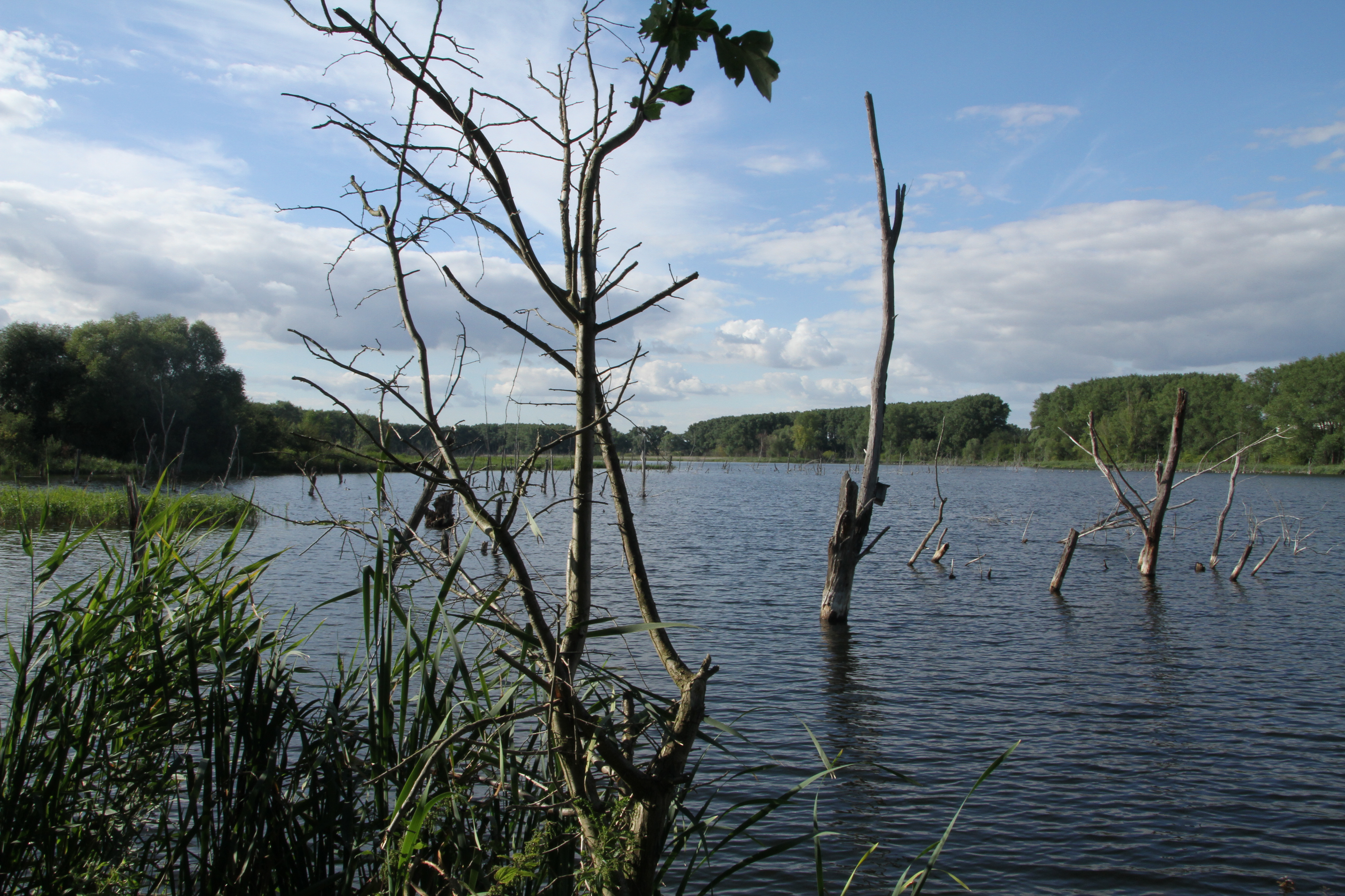 Blick über den Aschersleber See (auch Wilsleber oder Wilslebener See genannt) in Aschersleben, Sachsen-Anhalt; im Vordergrund abgestorbene Bäume im Wasser; der See und seine Umgebung liegen im Naturschutzgebiet „Wilslebener See“